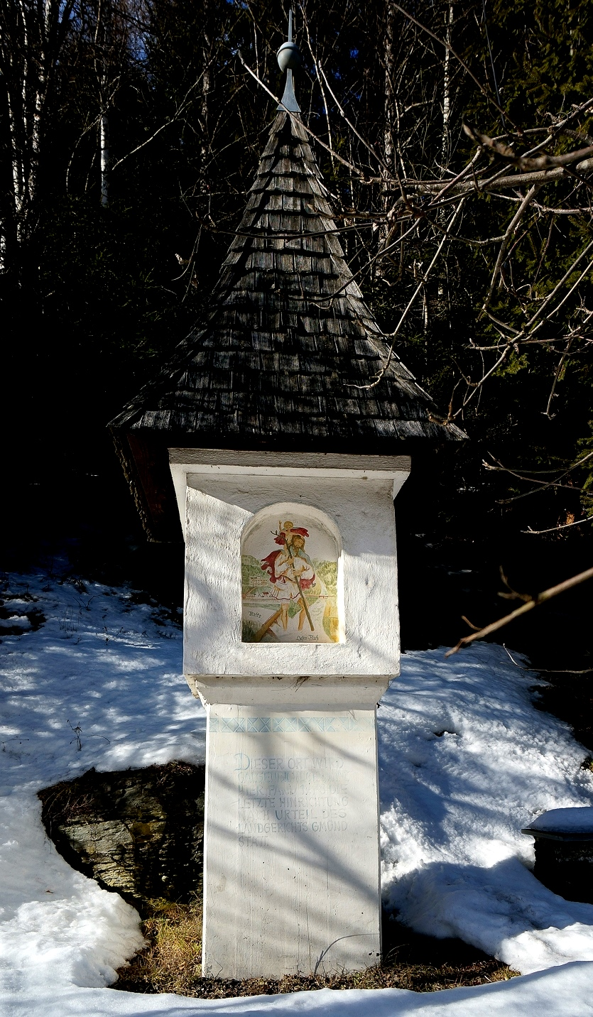 Bildstock Gmünd in Kärnten, Bezirk Spittal an der Drau mit der Inschrift: "Dieser Ort wird Galgenbichl genannt. Hier fand 1773 die letzte Hinrichtung gemäß Urteil des Landgerichtes Gmünd statt".Der Bildstock wurde 1984 errichtet und vom einheimischen Künstler Dieter Landsiedler bemalt. Das dargestellte Fresko zeigt den heiligen Christopherus, im Hintergrund das alte Gmünd. Auf den anderen Bildern sind die Justitia mit dem Gmündner Kerker und die Richtstätte mit dem heiligen Leonhard zu sehen. Quelle: Karl Lax: Aus der Chronik von Gmünd in Kärnten. Herausgegeben und ergänzt von Ilse Maria Tschepper-Lax, Gmünd 1987, 4. Auflage, S. 79